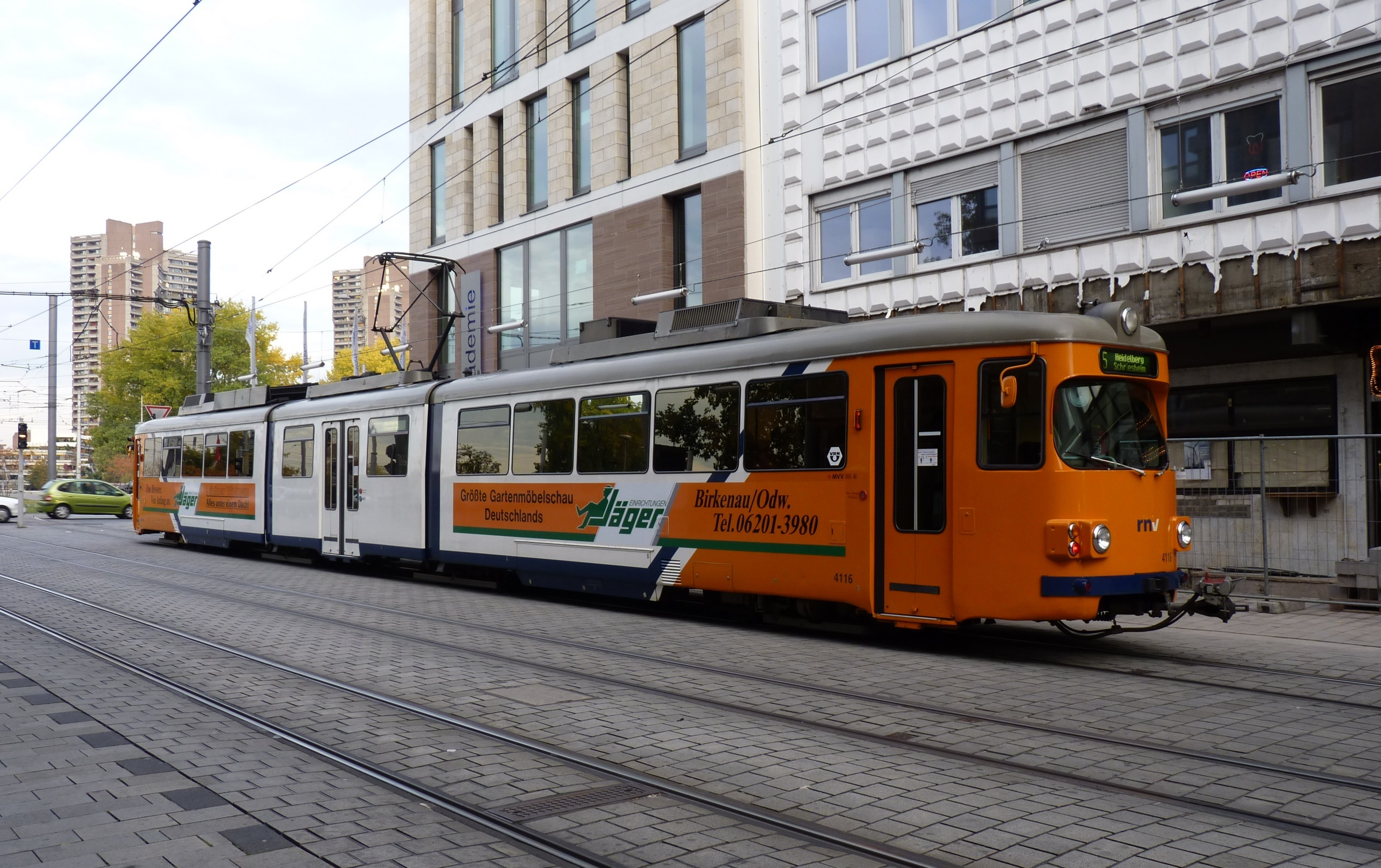 Streetcar Straßenbahn Tram Mannheim RNV Rhein-Neckar-Verbund